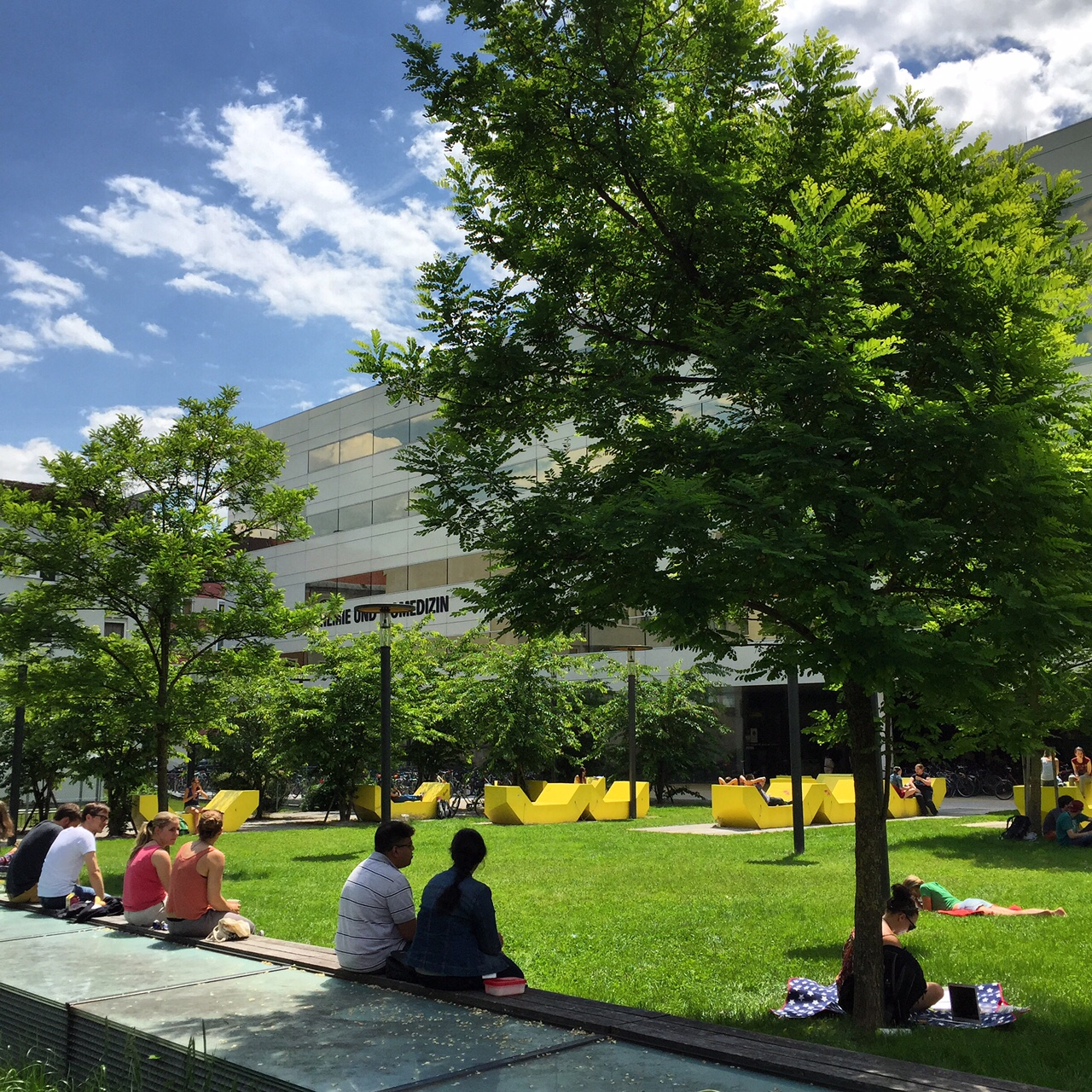 Blick in Richtung Centrum für Chemie und Biomedizin (CCB) am Innrain in Innsbruck.